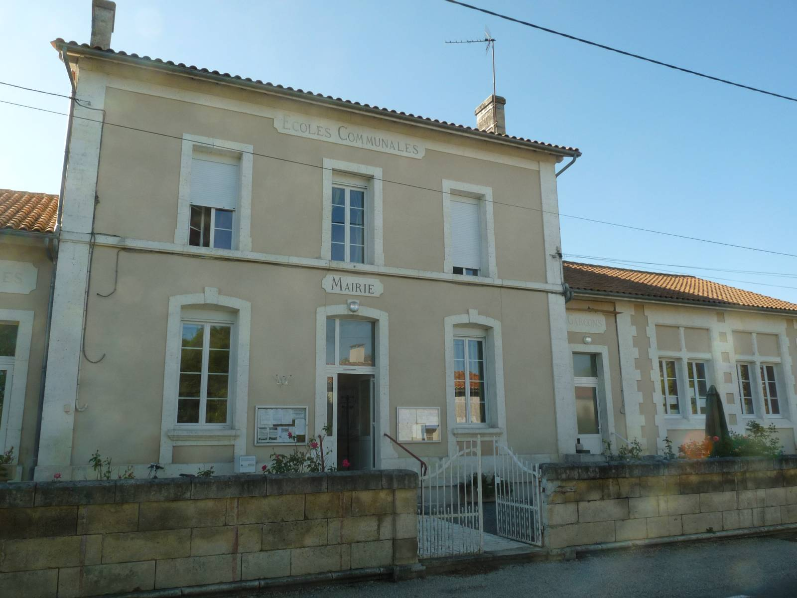 mairie de Bors-de-Montmoreau (16), France